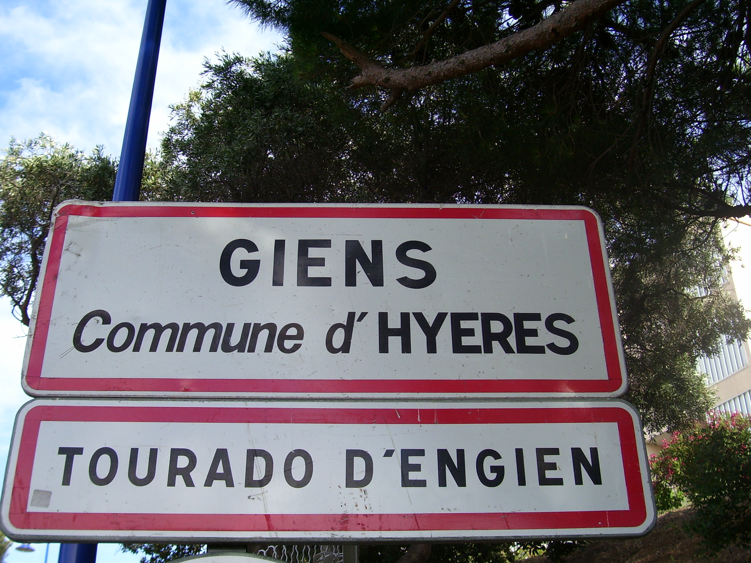 Cartello d'ingresso a Giens